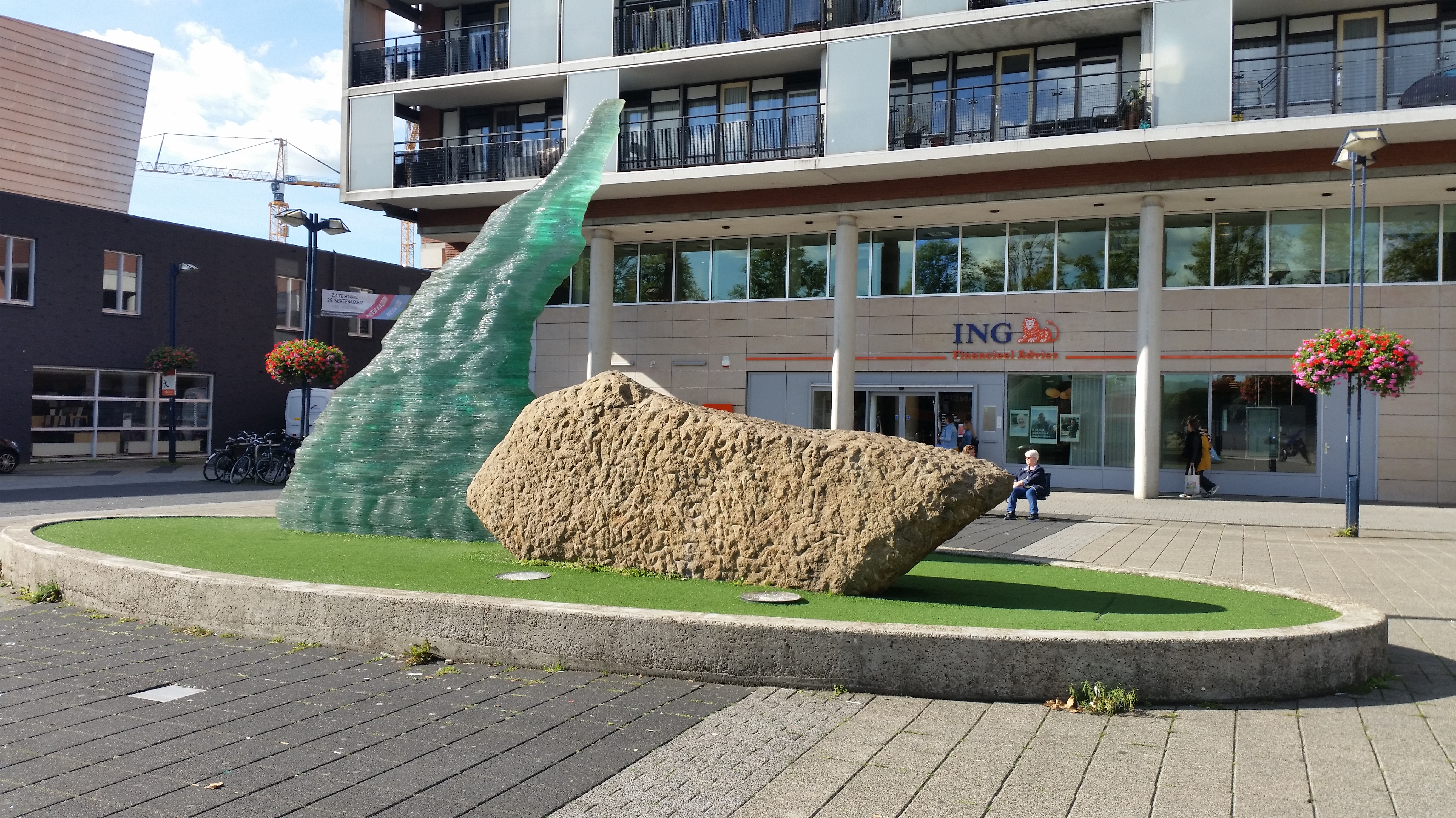 Senza parole voor het ING-filial Osdorpplein/Meer en Vaart, gezien vanaf Meer en Vaart